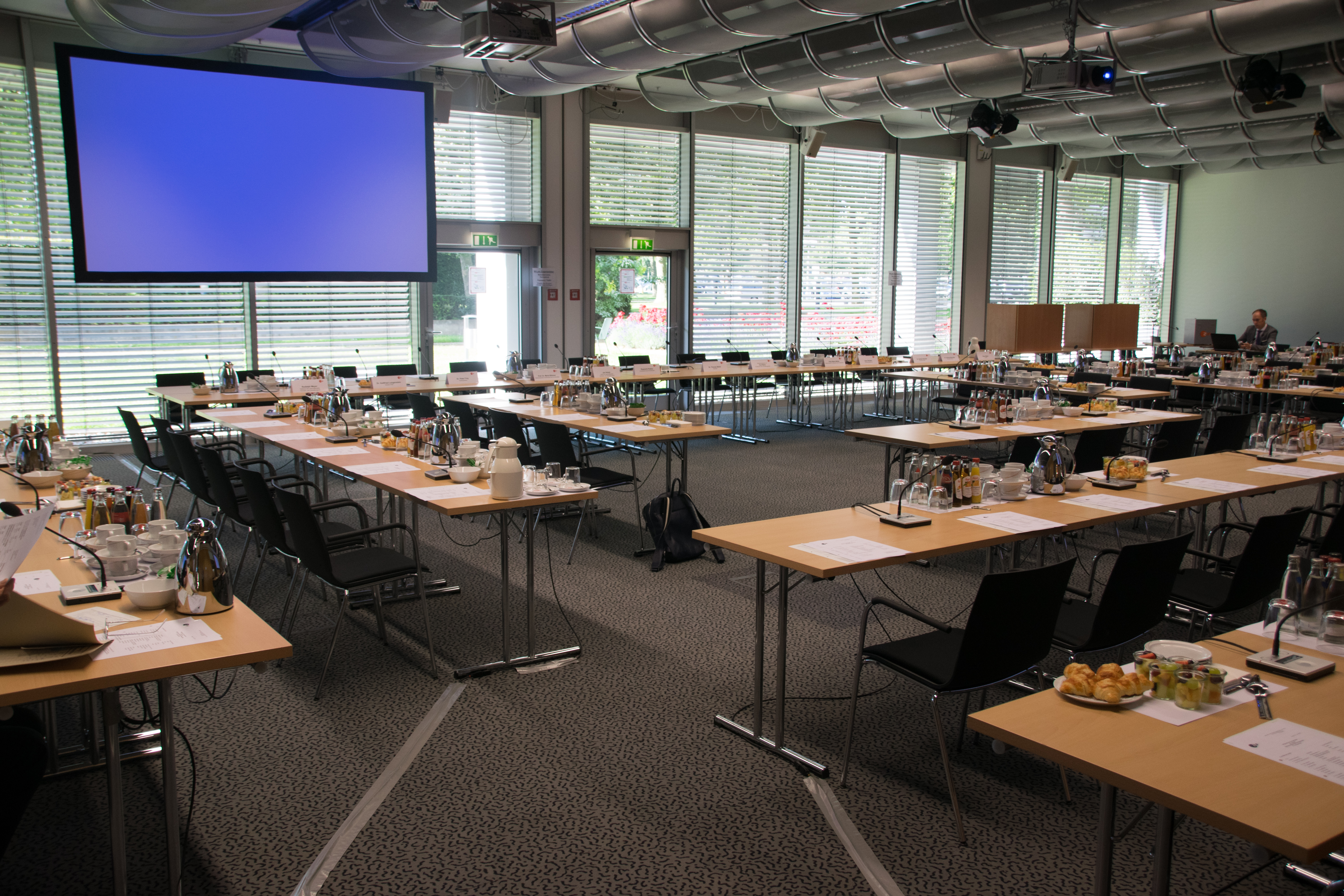 Sitzung des ZDF Fernsehrates am 8. Juli 2016 in Mainz, ZDF Sendezentrum